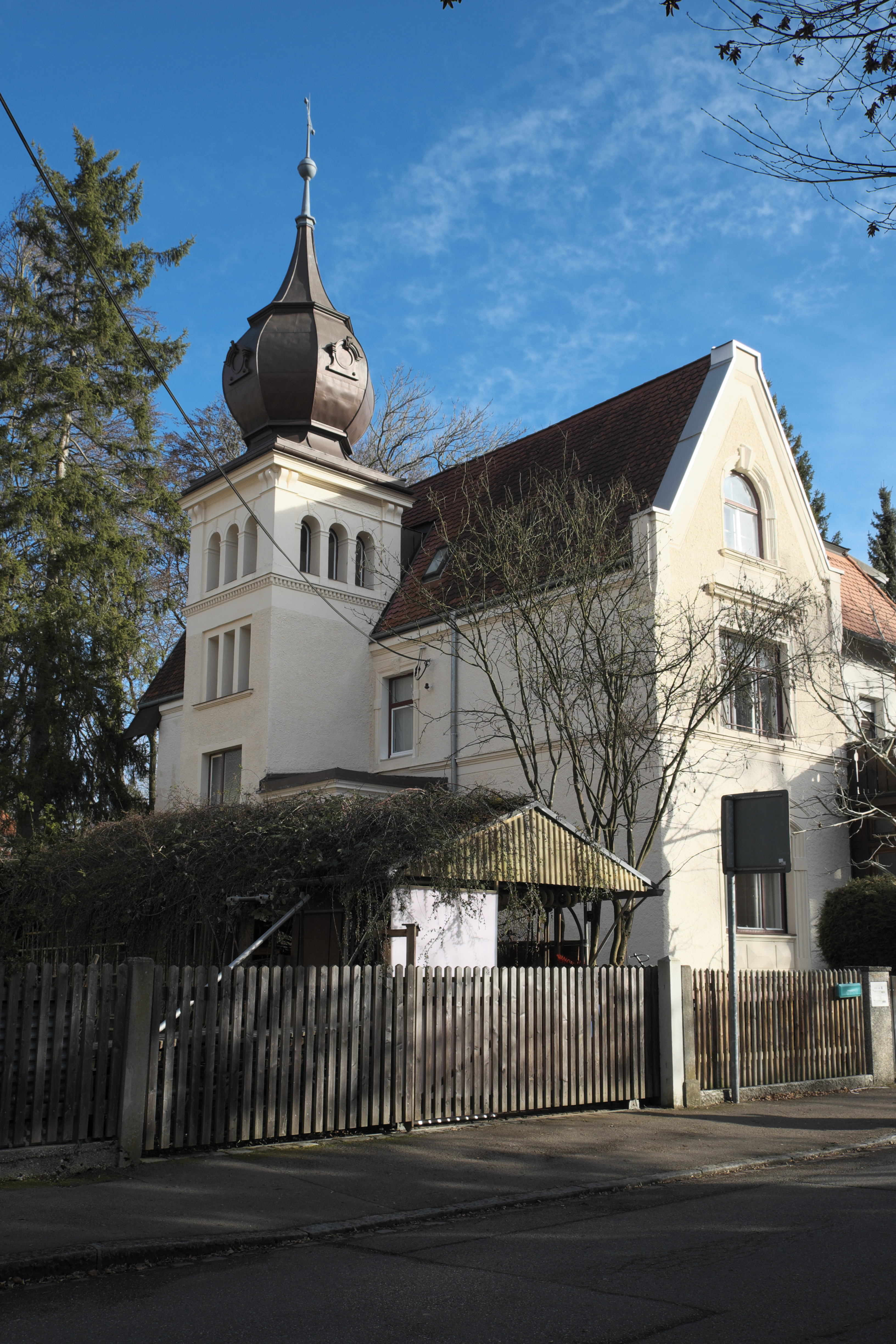 Villa in der Wehnerstraße 20 in Pasing im Stadtbezirk Pasing-Obermenzing in München (Bayern/Deutschland)